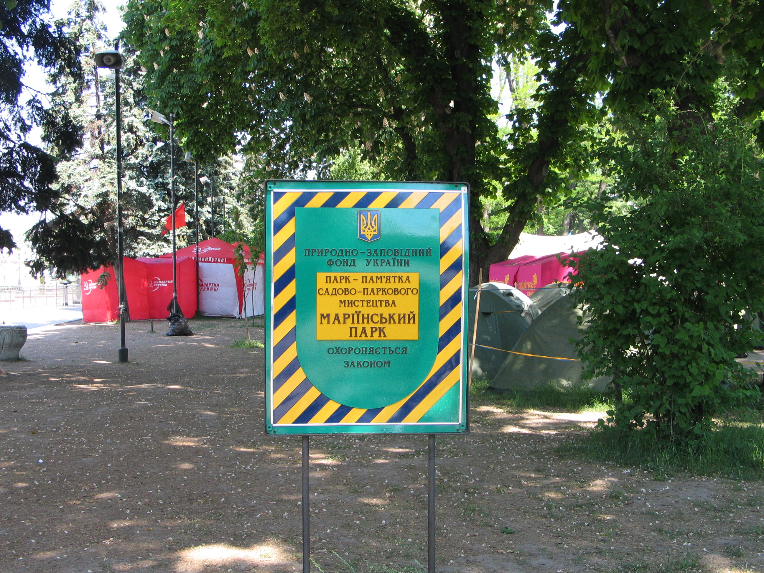 Палатки протестующих в Мариинском парке в Киеве